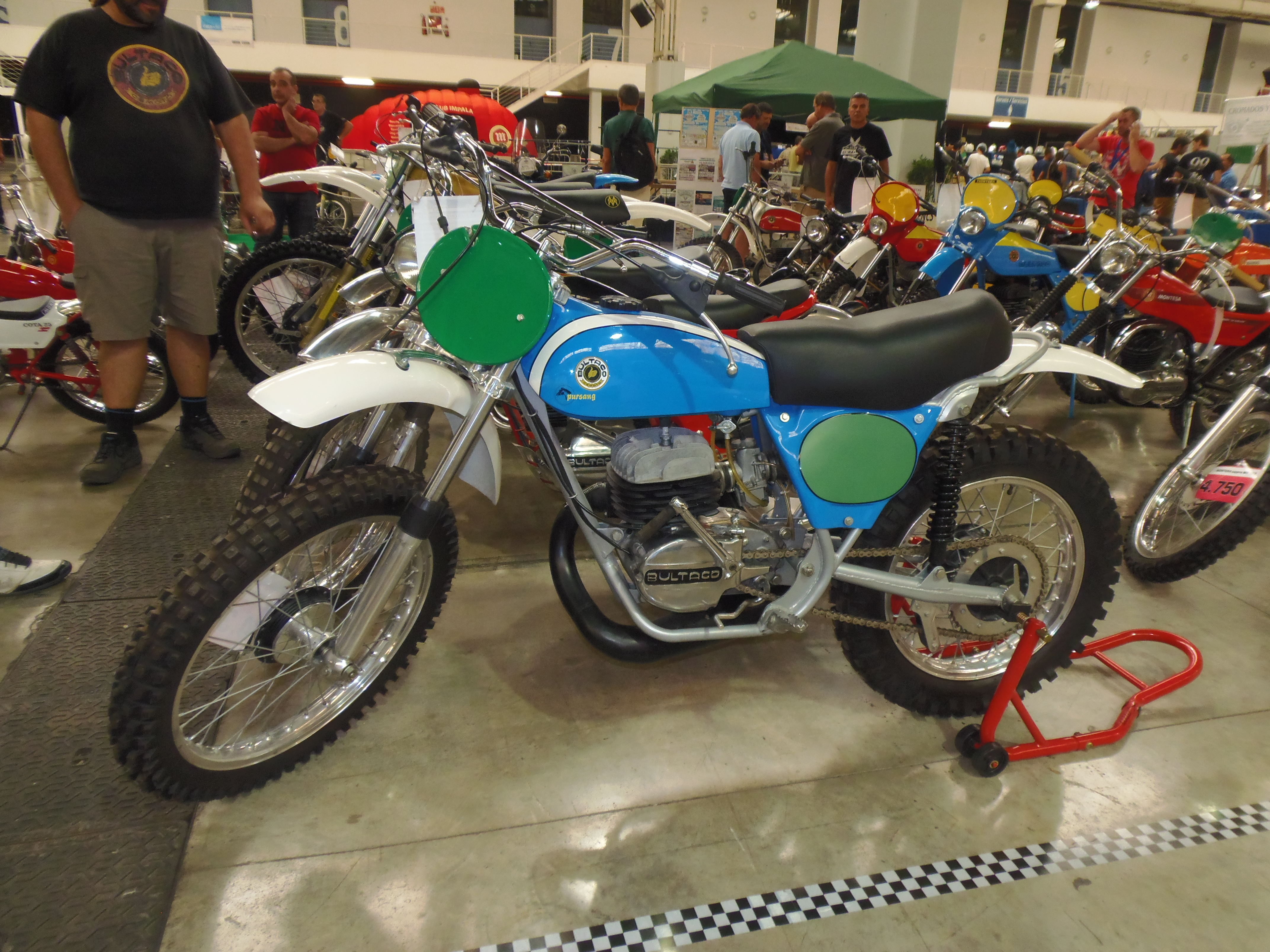 Bultaco Pursang Mk8 250, 1974